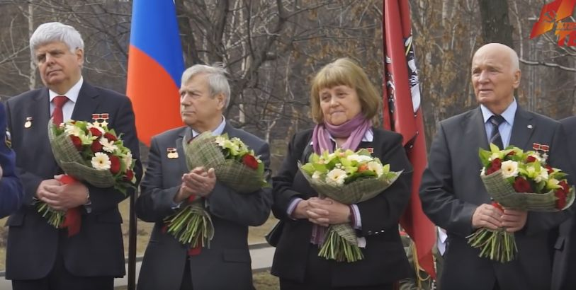 Советские космонавты, Герои Советского Союза Владимир Соловьёв, Александр Александров, Светлана Савицкая и Валентин Лебедев на аллее Космонавтов в Москвы 9 апреля 2016 года